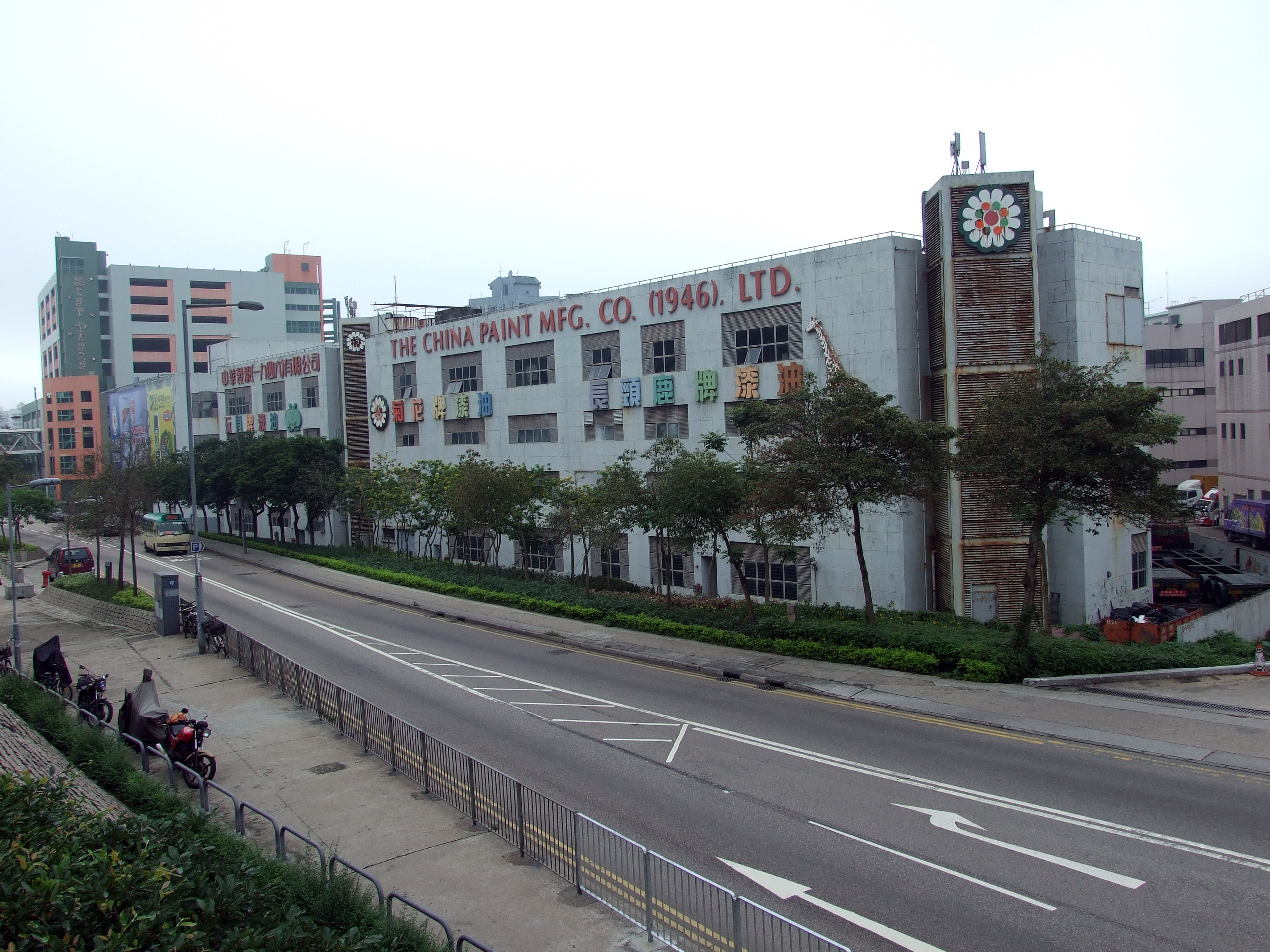 中文（香港）: 中華製漆位於西貢的廠房